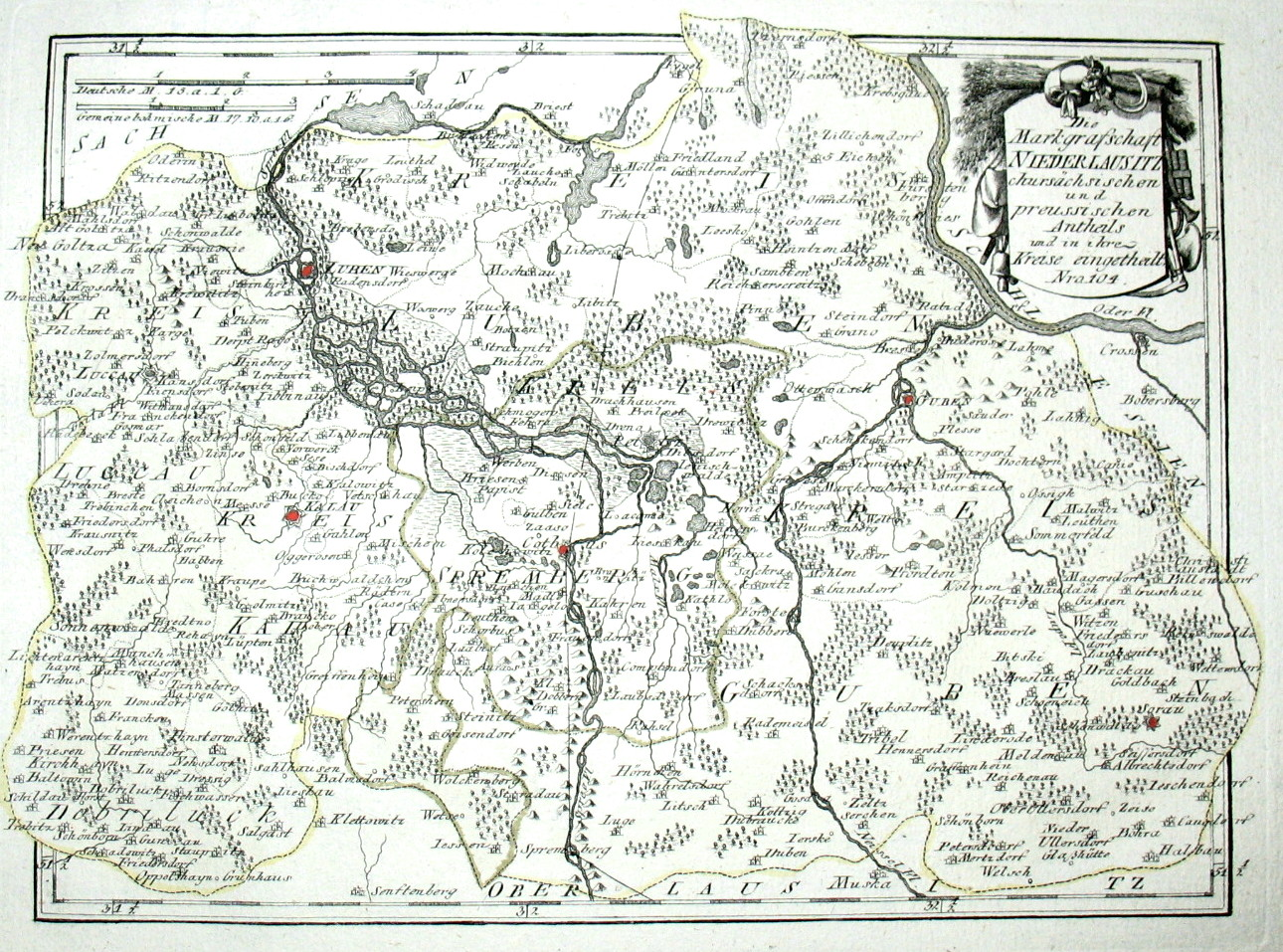 Die Markgrafschaft Niederlausitz chursächsischen und preussischen Antheils und in ihre Kreise eingetheilt. Nro. 104. Kolorierter Kupferstich, 27 × 20 cm